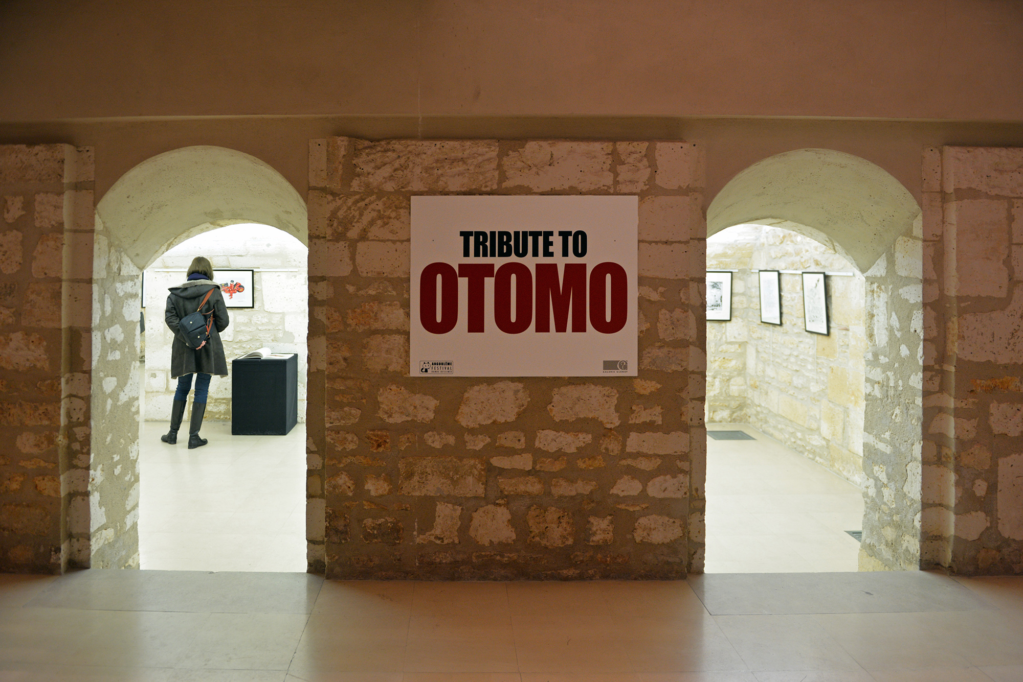 Entrée de l'exposition hommage à Katsuhiro Otomo, Festival International de la Bande Dessinée d'Angoulême 2016.